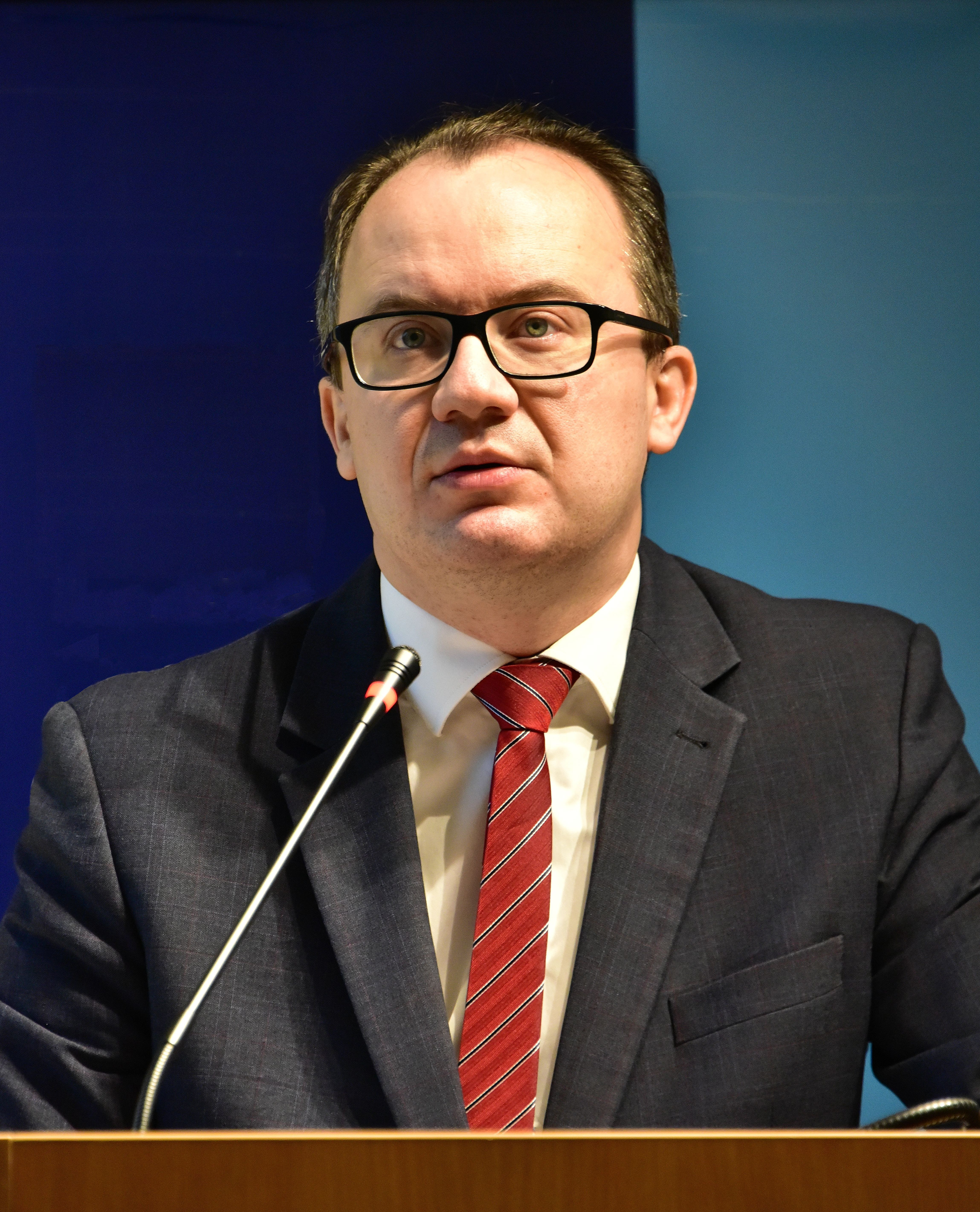 Dr Adam Bodnar, Rzecznik Praw Obywatelskich